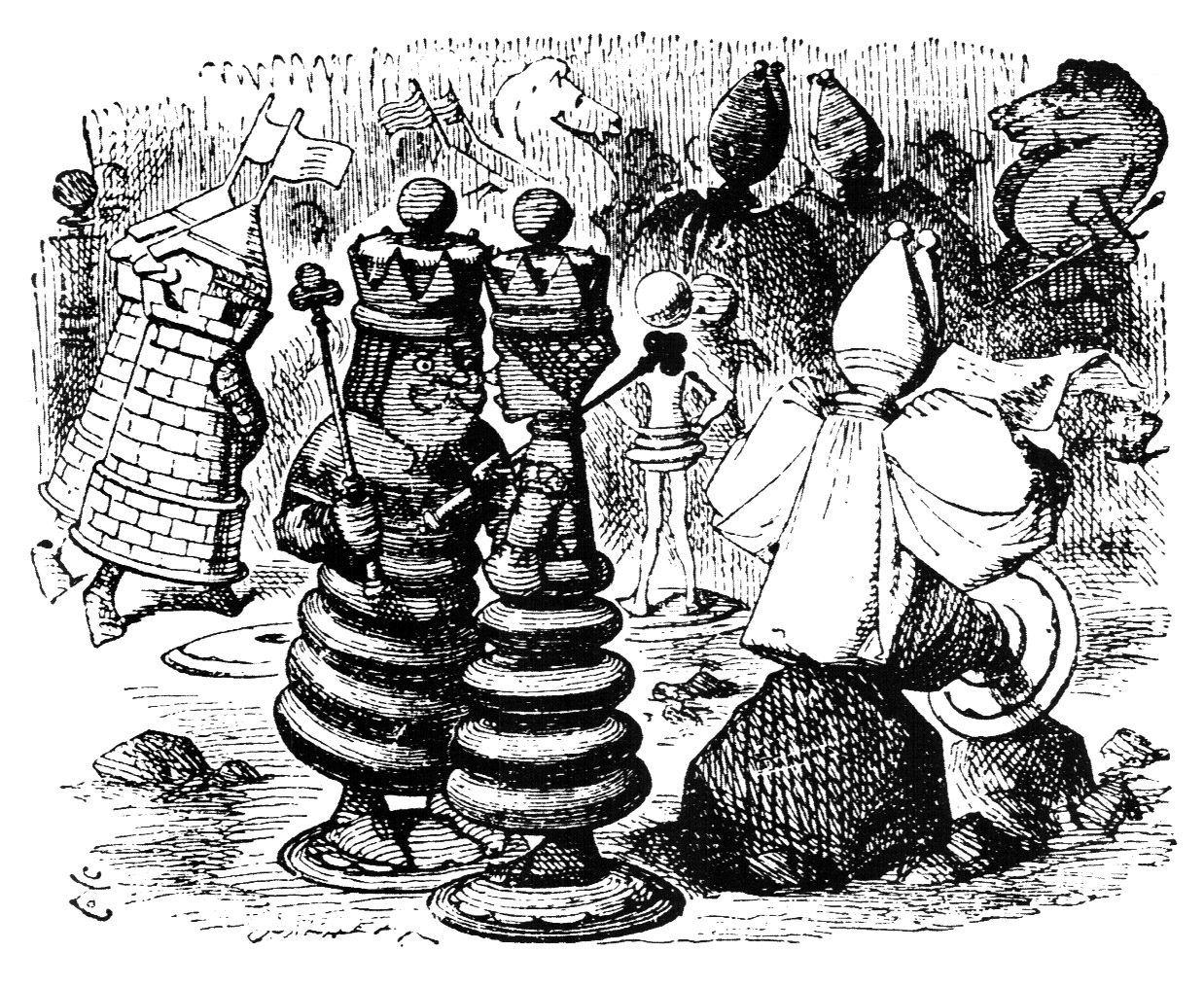 гравюра Джона Тенниела